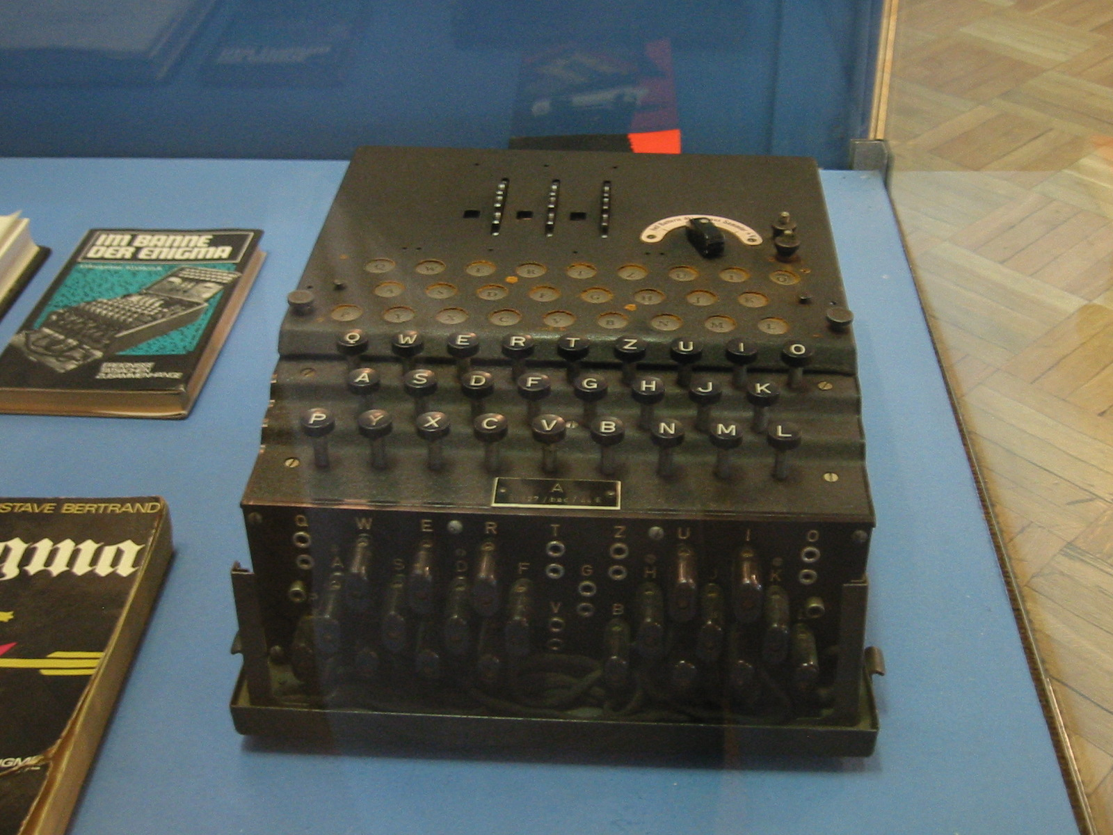 Enigma machine in Warzaw museum